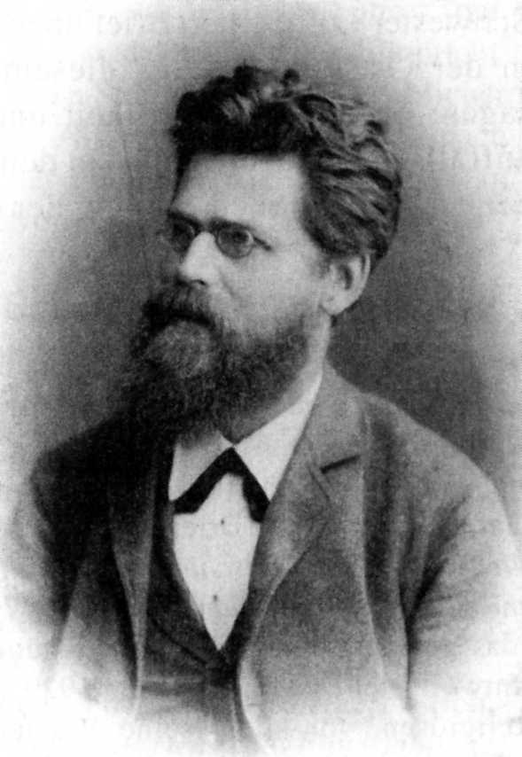 Otto Seeck (1850–1921), deutscher Althistoriker, während seiner Greifswalder Zeit (1881–1907)